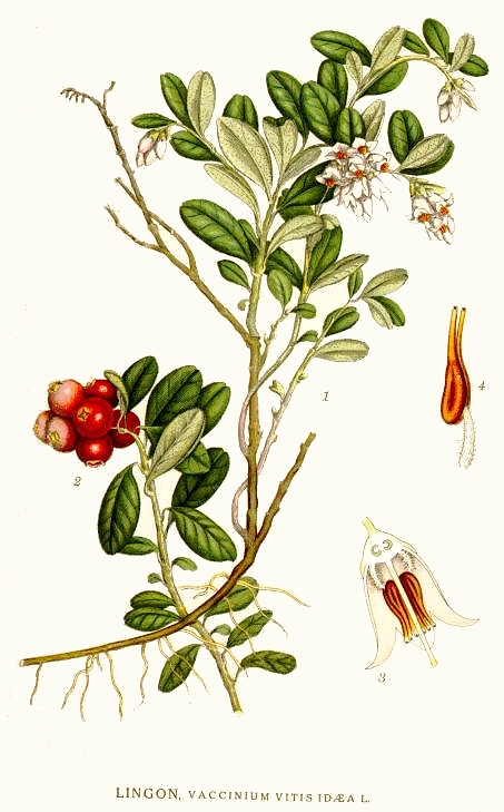 Original Description Lingon, Vaccinium vitis-idaea L.